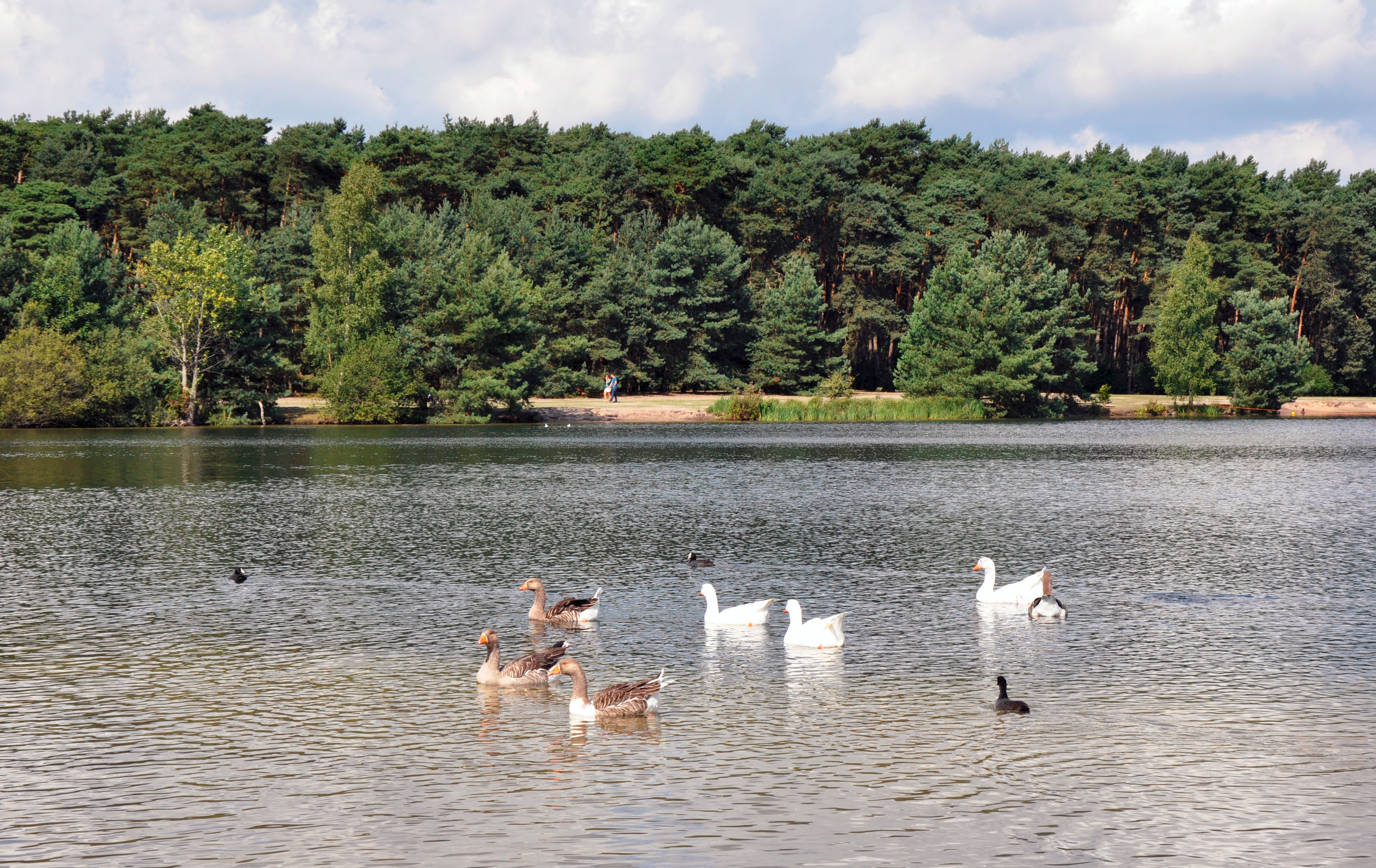 Kempense Meren - faune et flore du lac Rauwse Meer